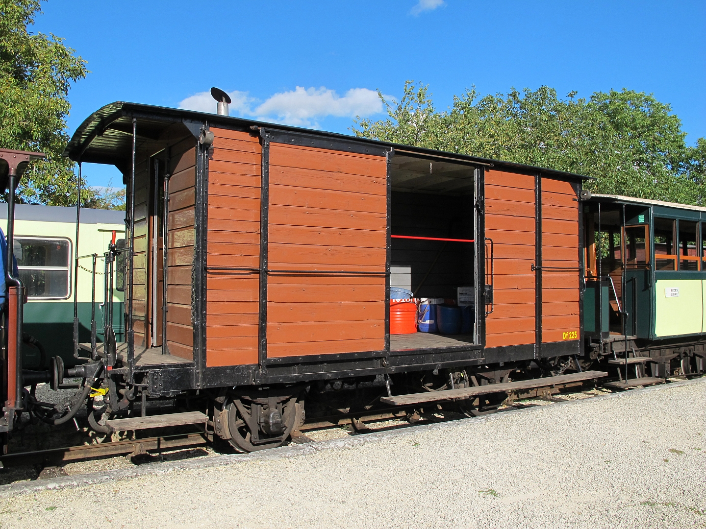 Le fourgon Df-225 ex-Réseau Breton et POC sur le train du Bas-Berry le 23 août 2015.